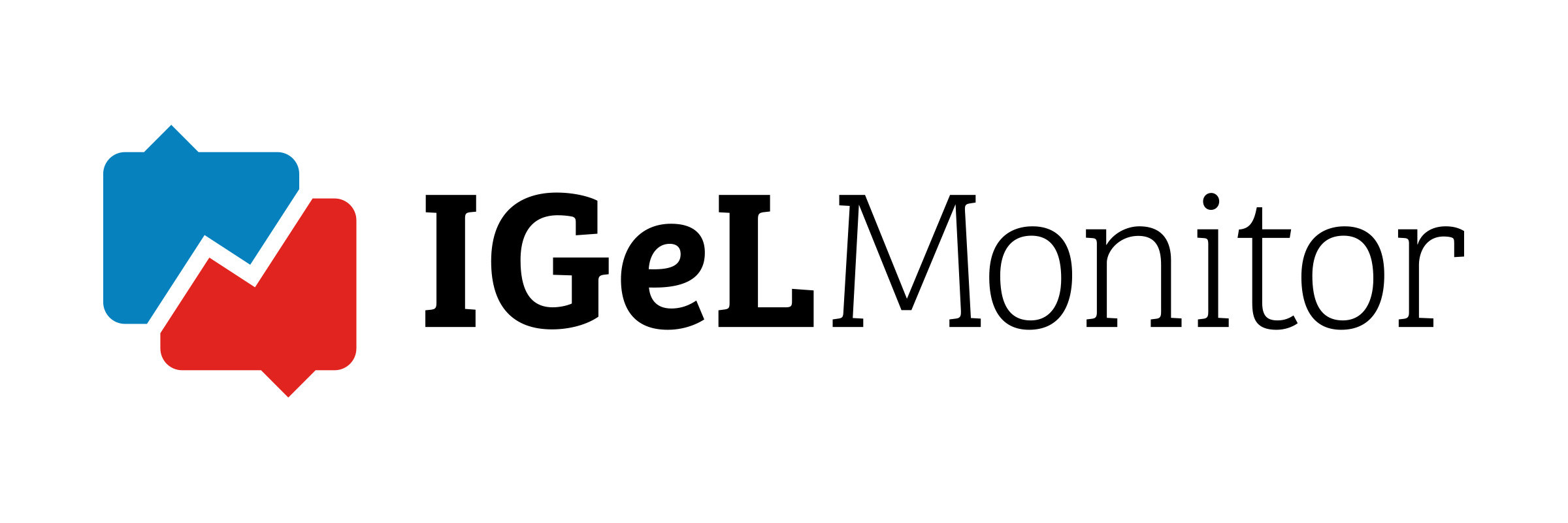 Logo des IGeL-Monitors. Der IGeL-Monitor bewertet Nutzen und Schaden von Individuellen Gesundheitsleistungen ("Selbstzahlerleistungen") nach hohem wissenschaftlichen Standard. Der IGeL-Monitor ist ein Projekt des Medizinischen Dienstes Bund der Krankenkassen (MDS).